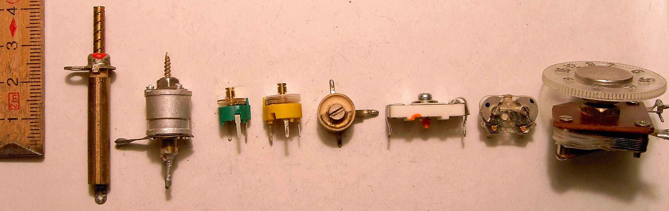 Müxtəlif dəyișkən kondensatorlar